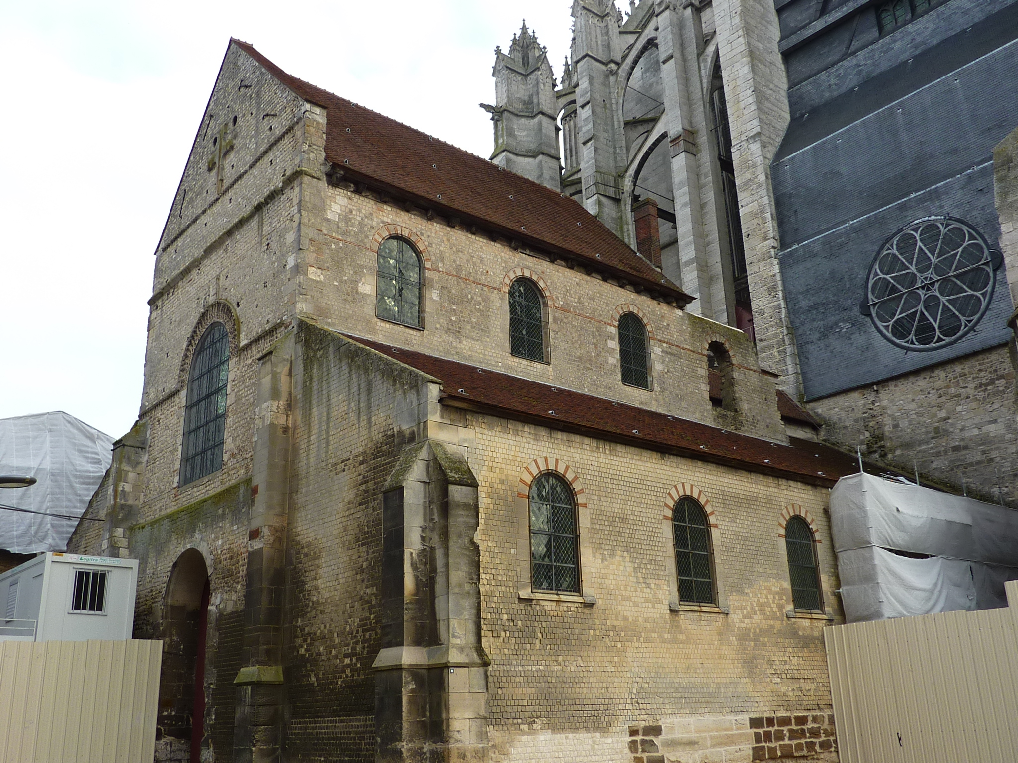 Église Notre-Dame-de-la-Basse-Œuvre de Beauvais, au pied de la Cathédrale Saint-Pierre de Beauvais